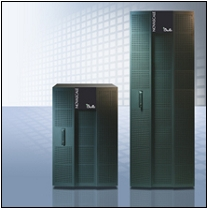 Intensive Line 3005 Series NovaScale ® 3025